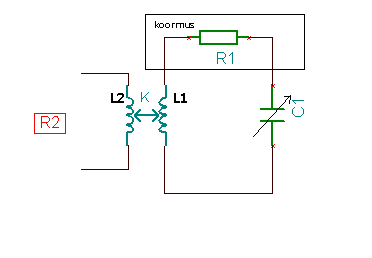 Induktiivne sidestus jadakoormusega. Tehtud TinaSpice abiga